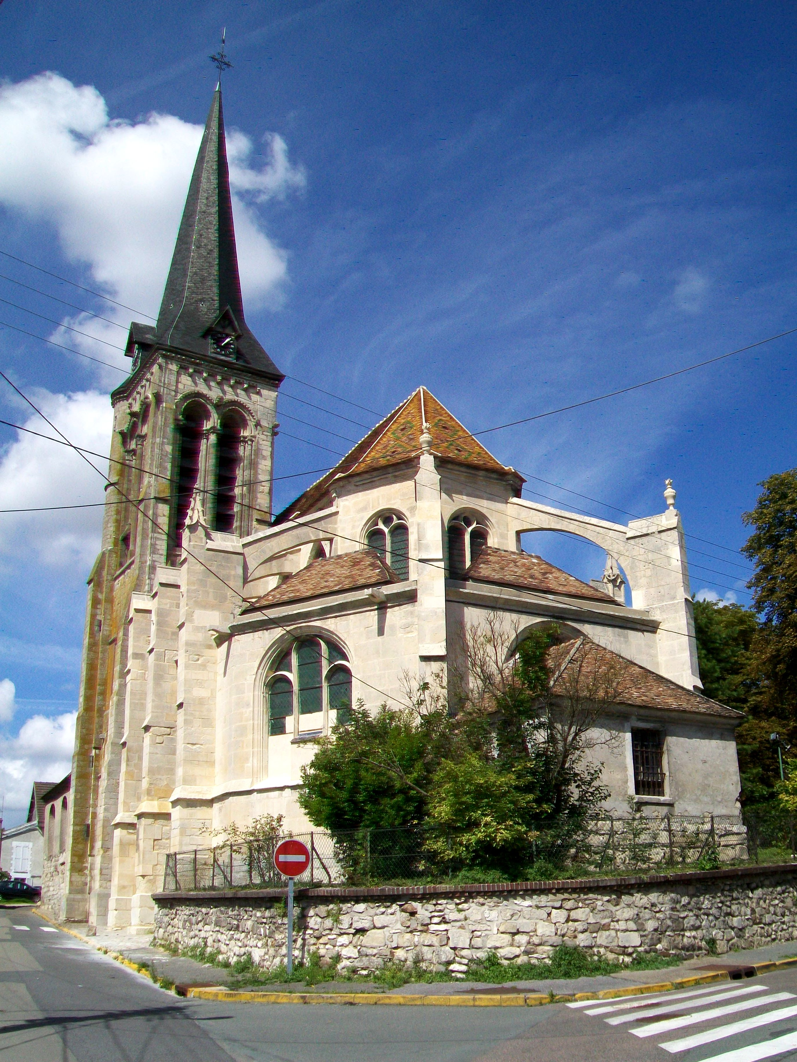 L'église Saint-Aquilin depuis l'est.